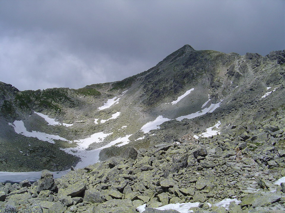 Furkotsky stit from Furkotska dolina